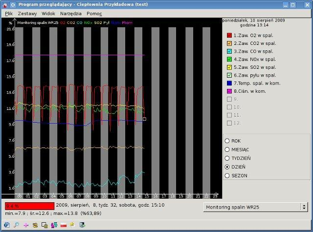 Program przedstawiający 10-minut wartości średnich parametrów.